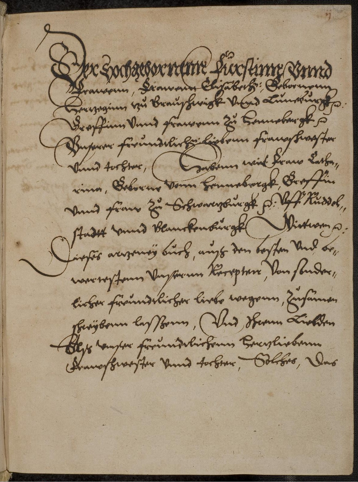 Codex Palatinus germanicus 200, "Katharina Gräfin von Schwarzburg: Rezeptsammlung", Blatt 2r der Handschrift (Widmung).